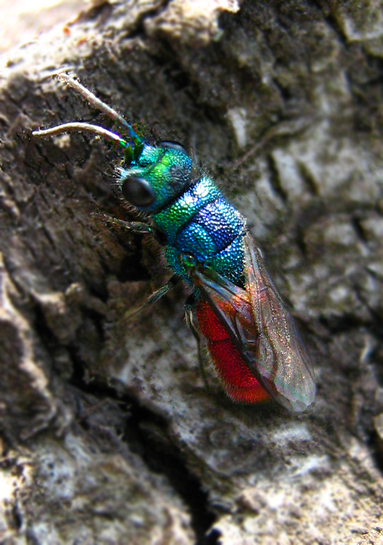 Оса-блискітка (Hymenoptera: Chrysididae) середніх розмірів, що часто зустрічається на деревині